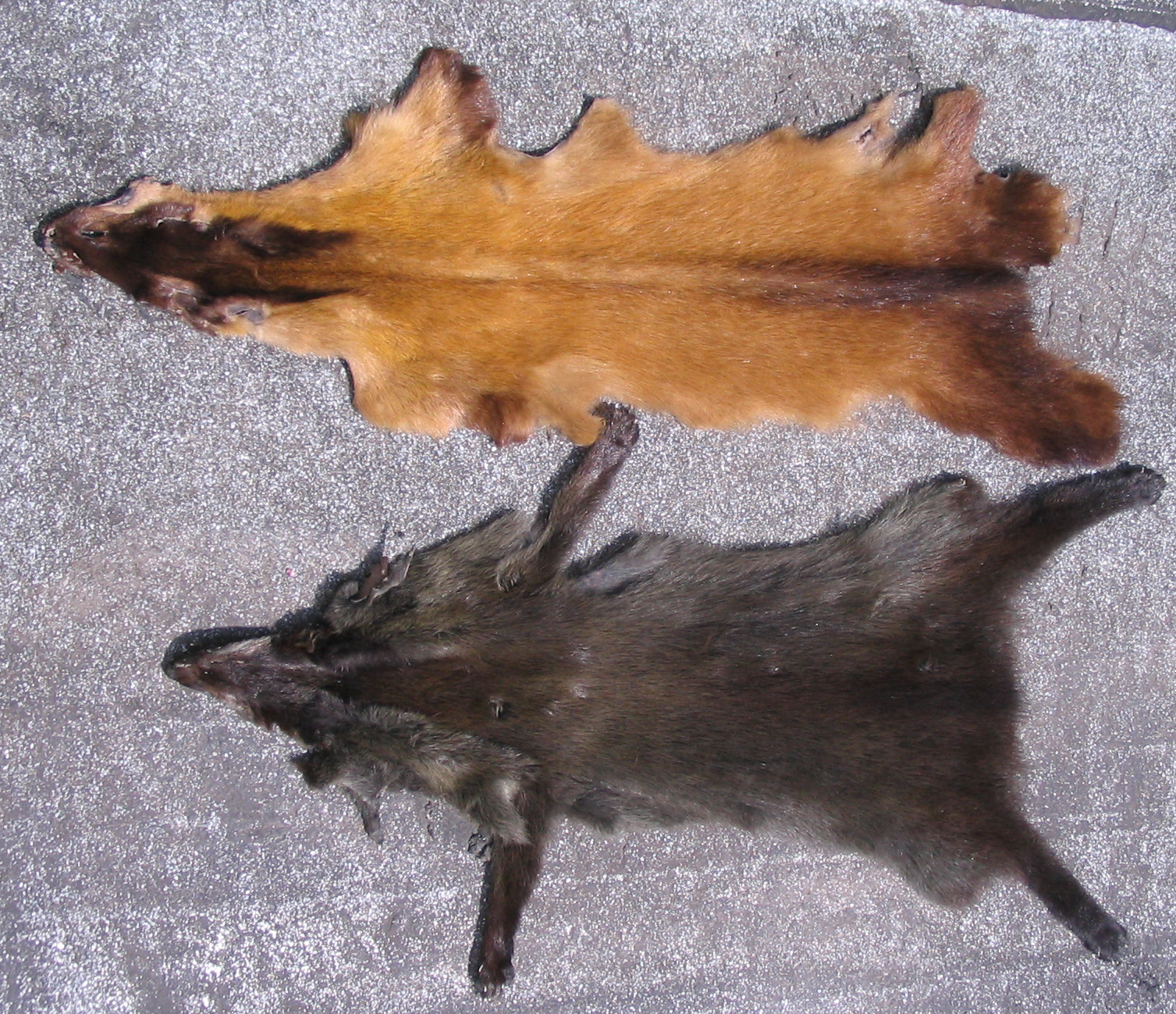 Zwei Charsamarderfelle, das untere Fell gefärbt. Gesehen bei Herhold Pelze, Wiesbaden